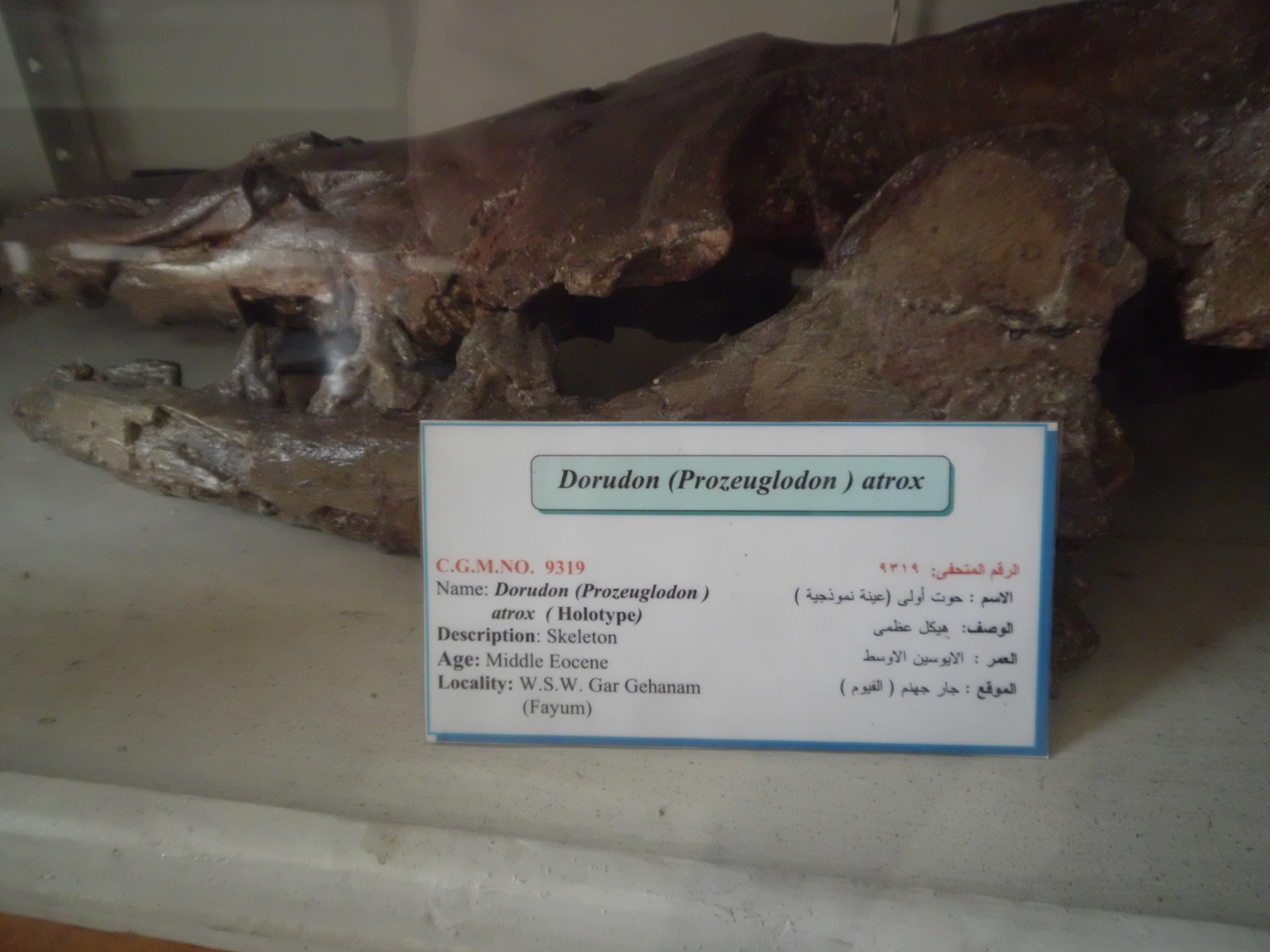 هيكل عظمي لحوت اولي (ديرودون) من عصر الايوسين الاوسط في جار جهنم الفيوم